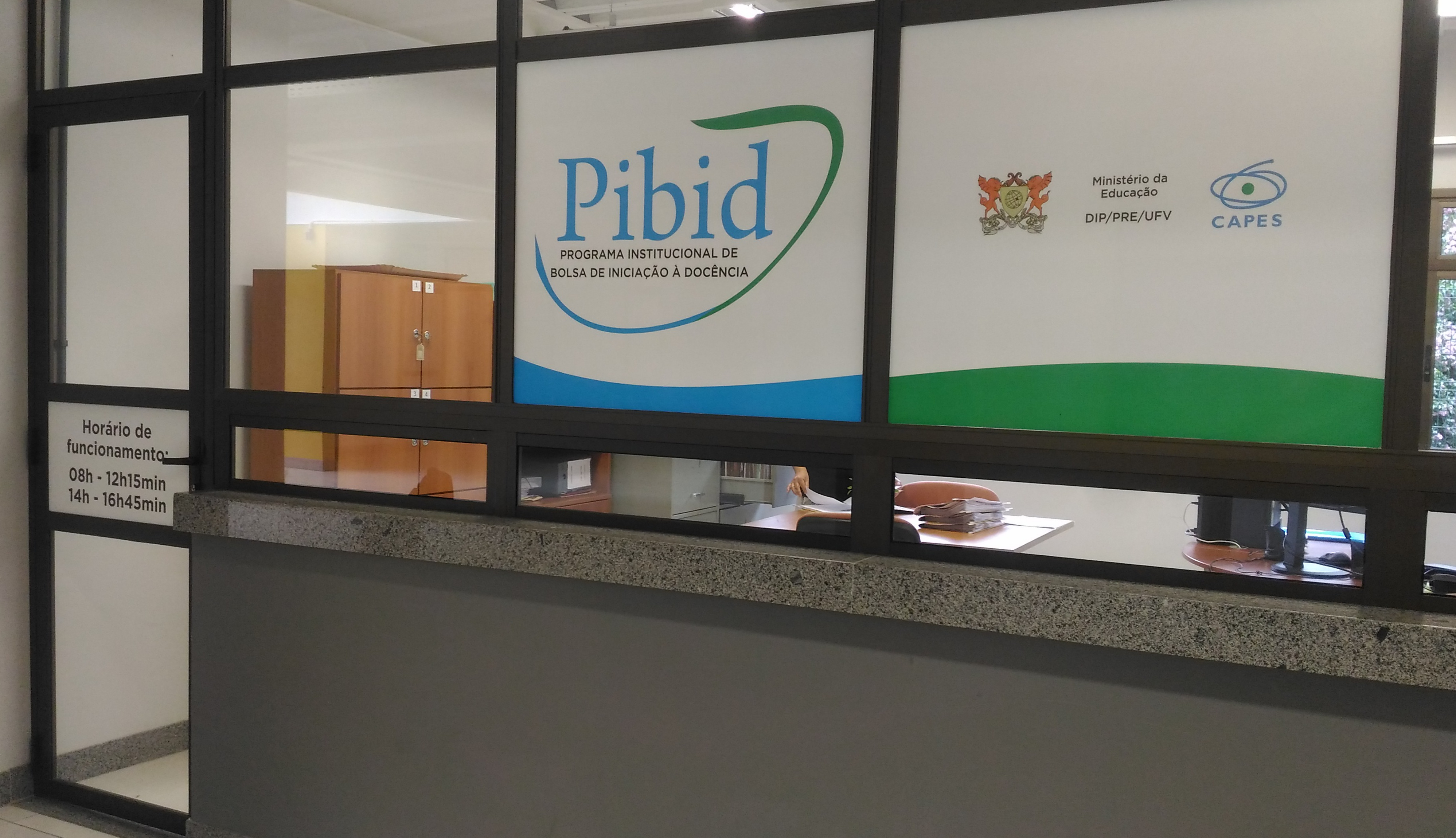 Secretaria do PIBID (Programa Institucional de Bolsas de Iniciação à Docência) no PLI (Edifício das Licenciaturas) na UFV (Universidade Federal de Viçosa), Viçosa-MG, Brasil. O PIBID é um programa governamental, financiado pela CAPES (Coordenação de Aperfeiçoamento de Pessoal de Nível Superior), que visa preparar estudantes de licenciatura para a futura profissão como docentes.